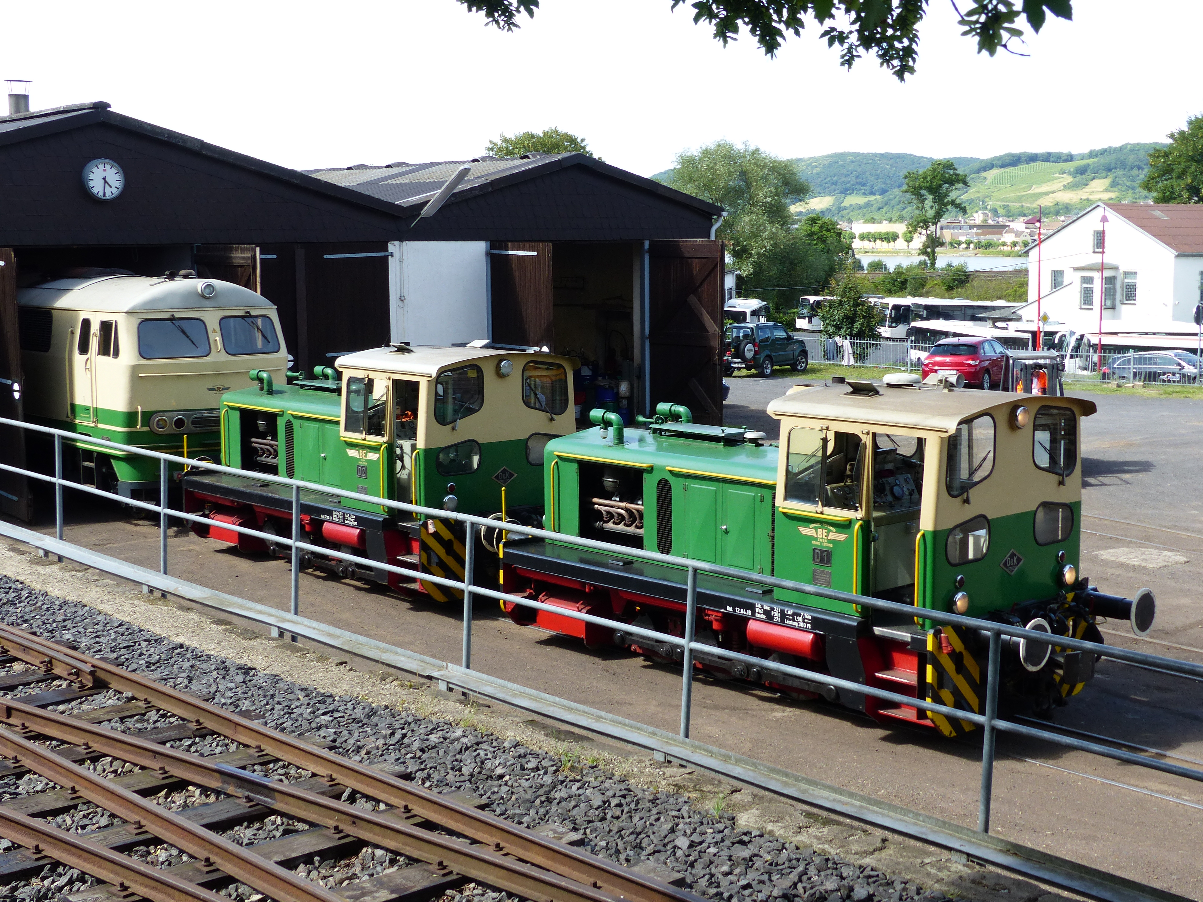 Dieselloks D1, D2 und D5 der Brohltalbahn vor dem Lokschuppen